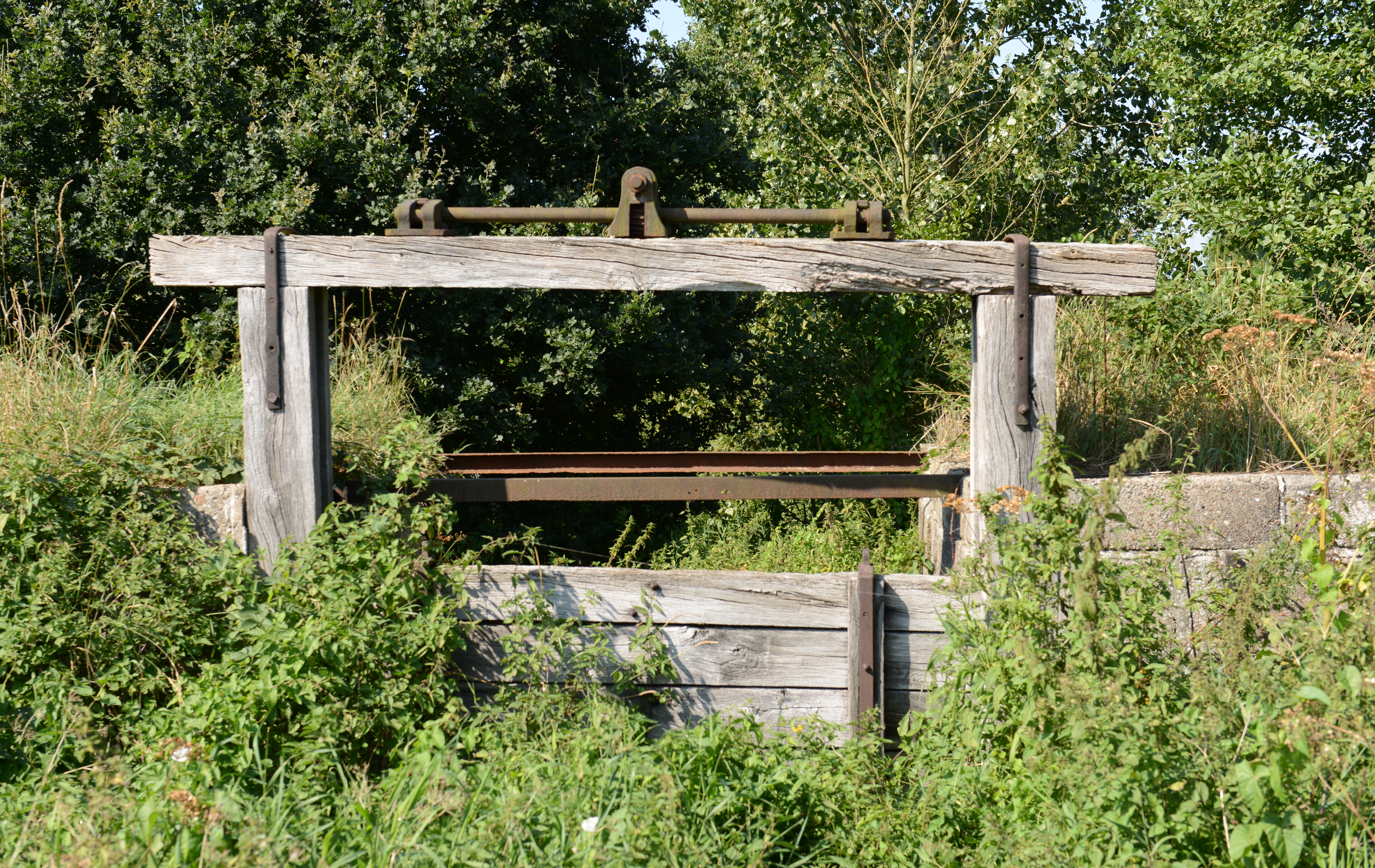 Baudenkmal in Syke Gödestorf